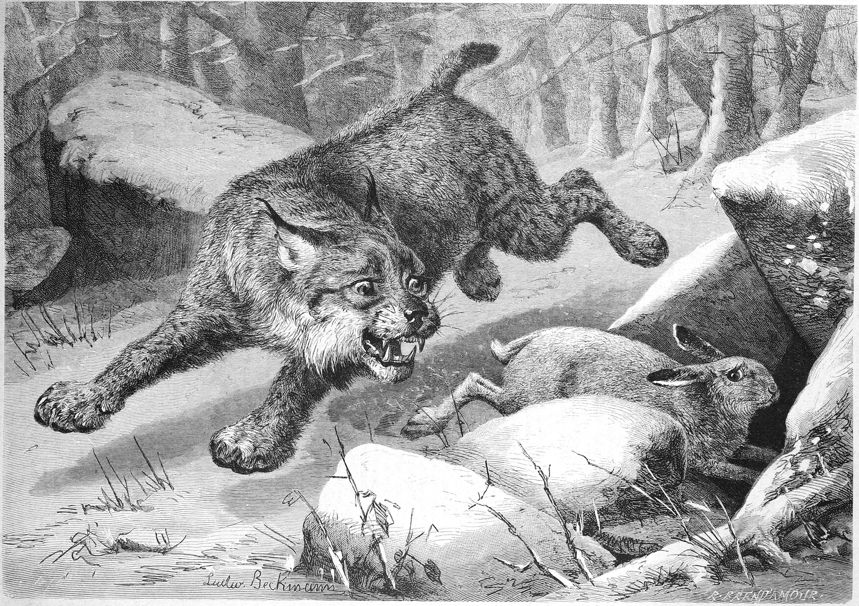 Lynx von Ludwig Beckmann